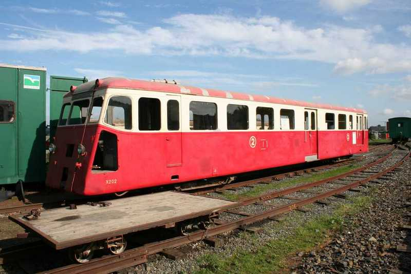 Autorail De Dion Bouton OC2 X 202 préservé par l'ACFCdN - en cours de restauration.